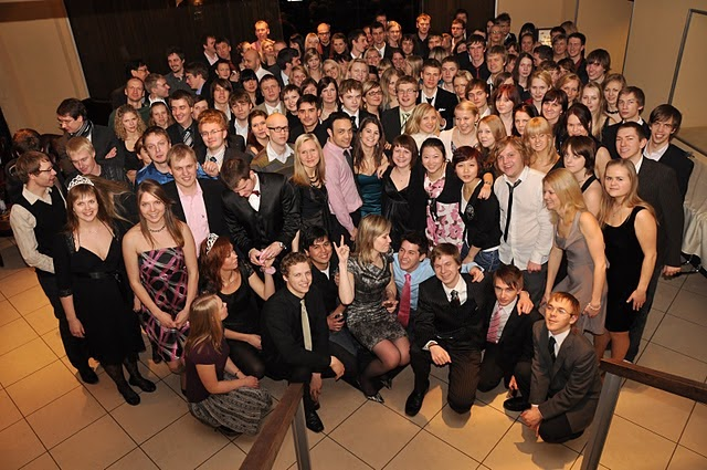 AIESEC Eesti liikmed iga aastasel konverentsil